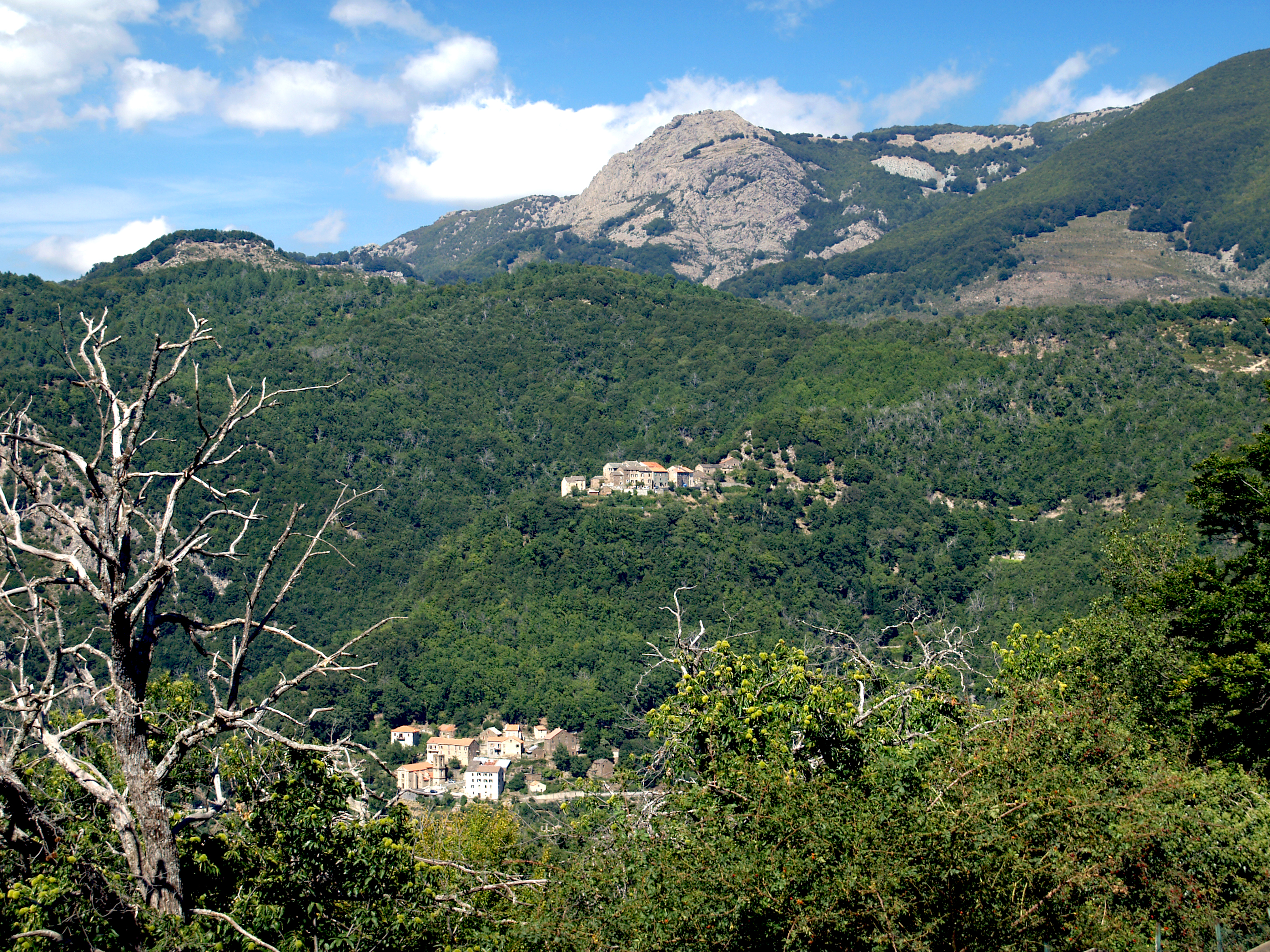 Mazzola (Corse) - Vue de Mazzola et de Castelluccio